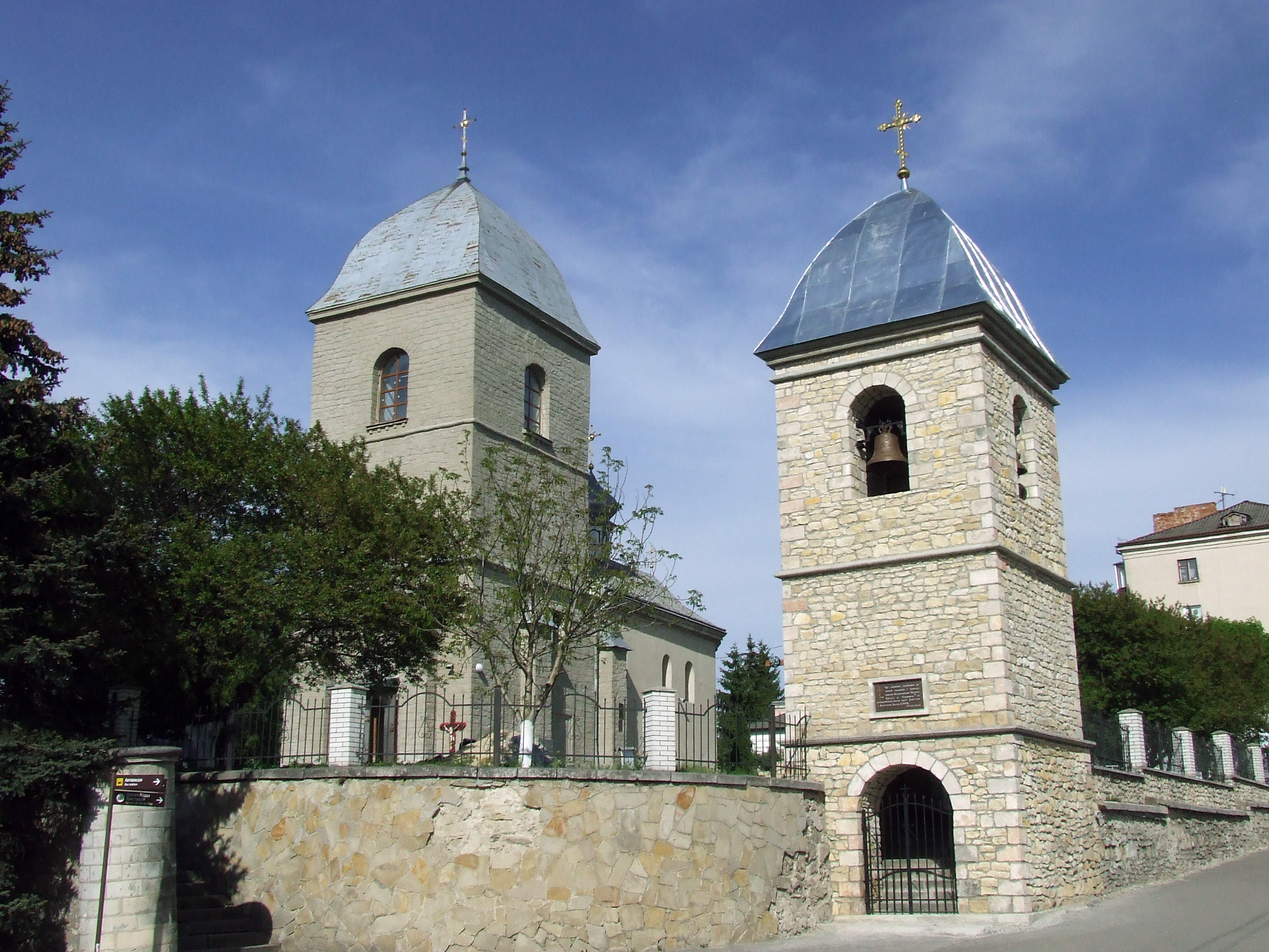 Церква Воздвиження Чесного Хреста: Церква Воздвиження Чесного Хреста в Тернополі.